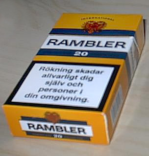 Foto av ett paket Rambler Gul.